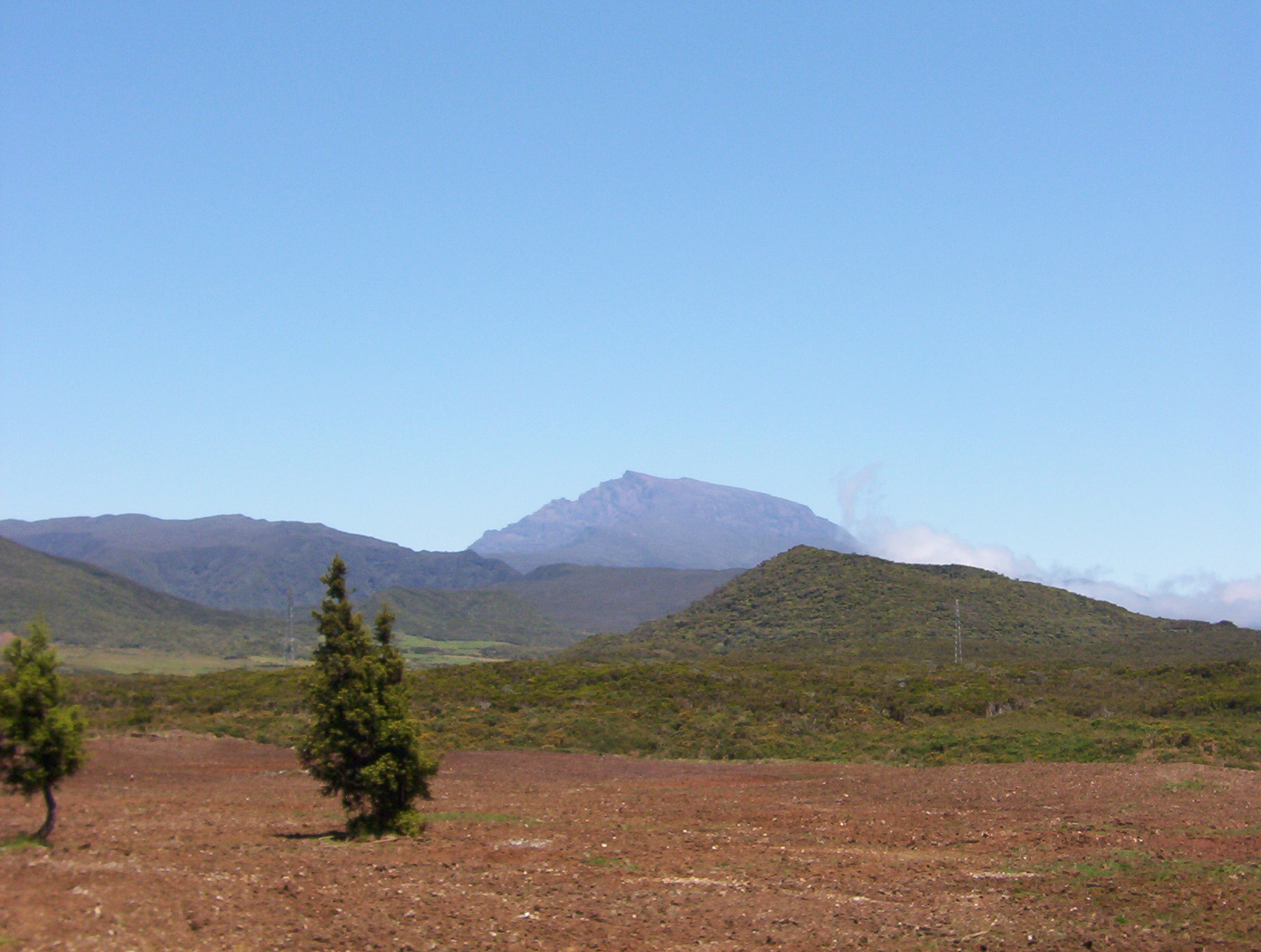 Photo d'une vue de la Plaine des Cafres, avec le Piton des neiges en second plan Photo perso, licence libre